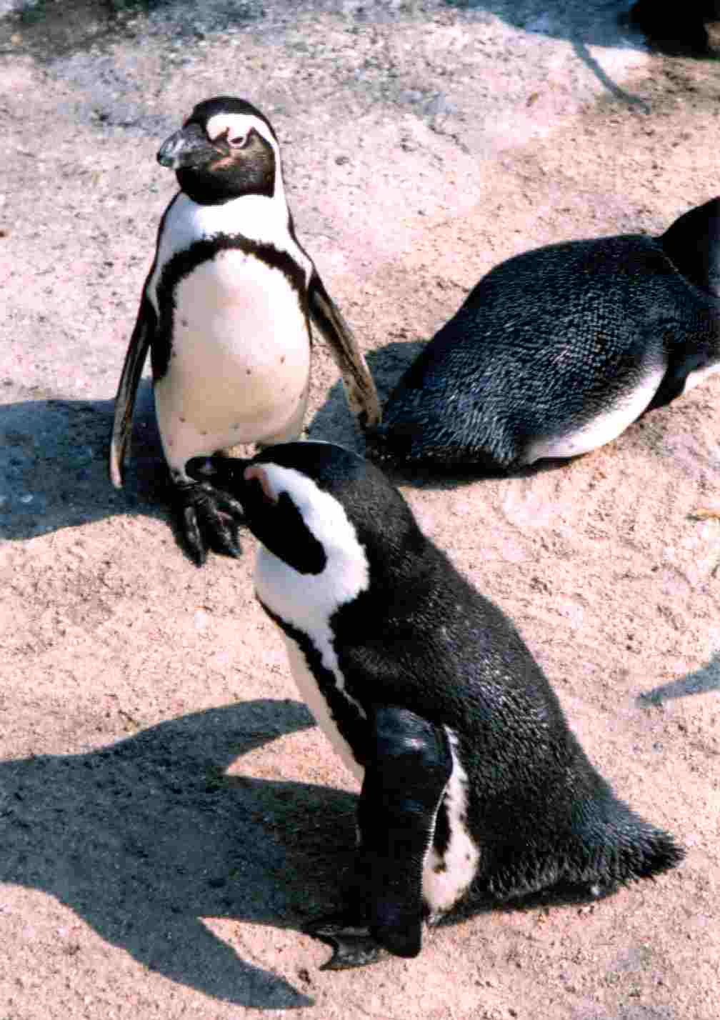 Brillenpinguine